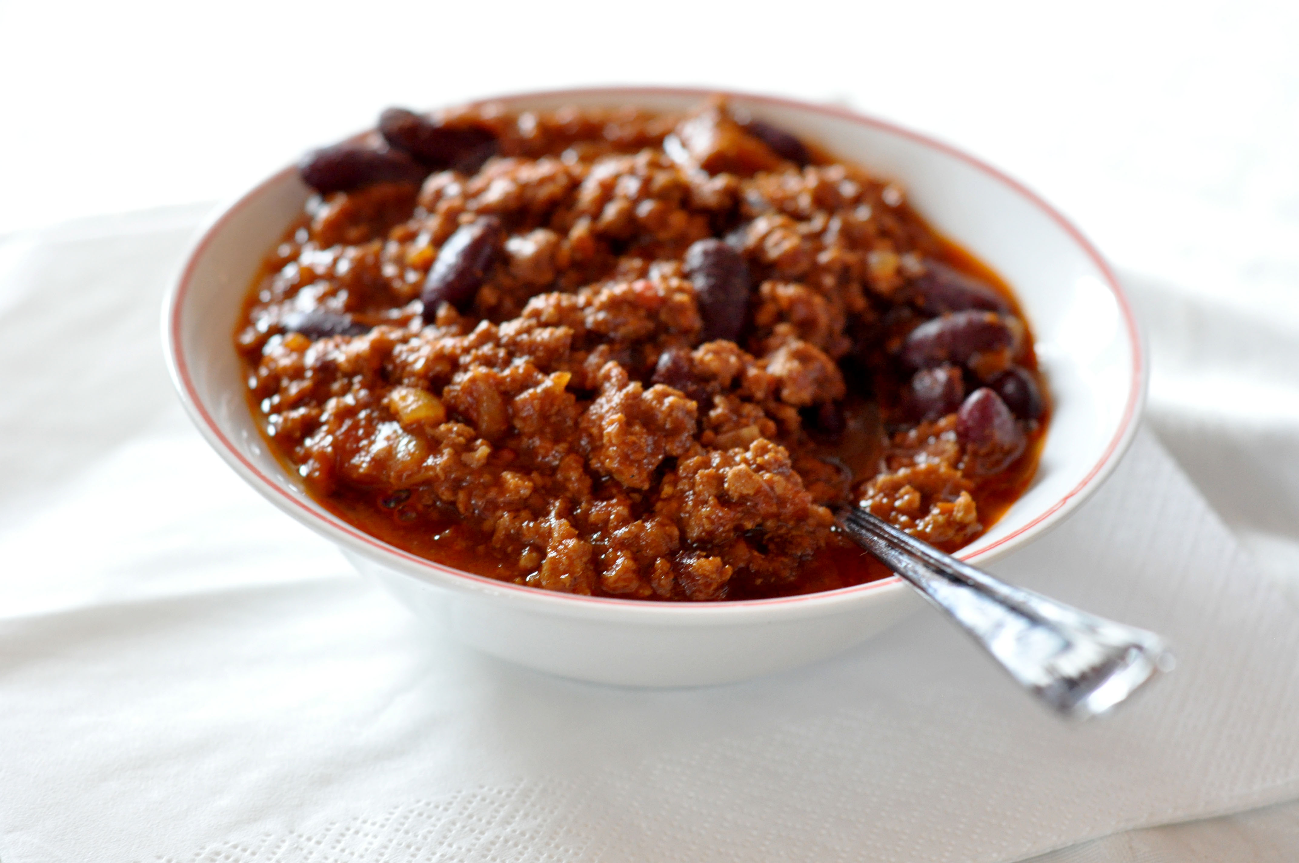 Chili con carne